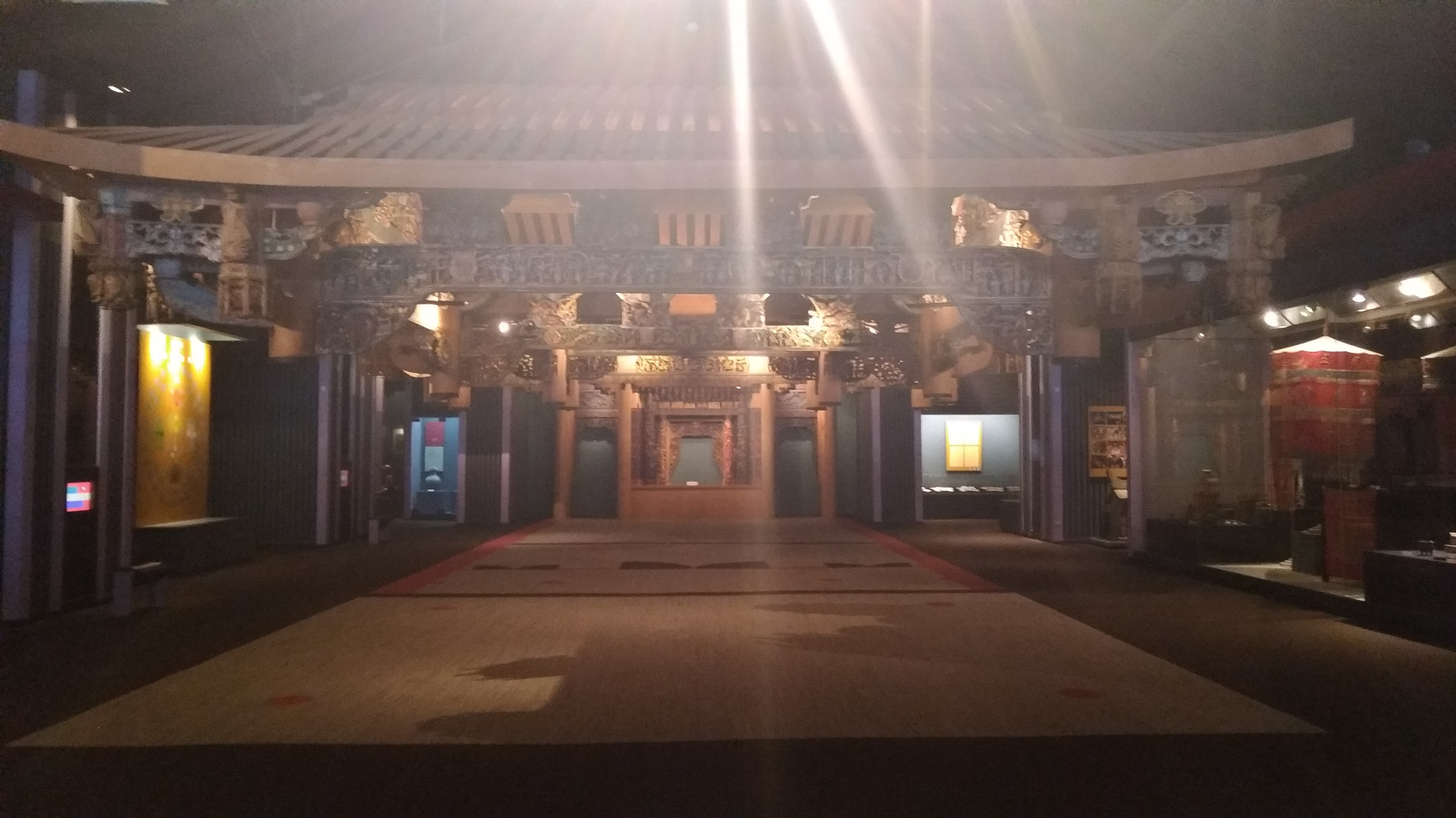 中文（台灣）: 原於高雄茄萣鄉的萬福宮，1987年拆除重建，國立自然科學博物館收藏原建物後設置於人類文化廳。